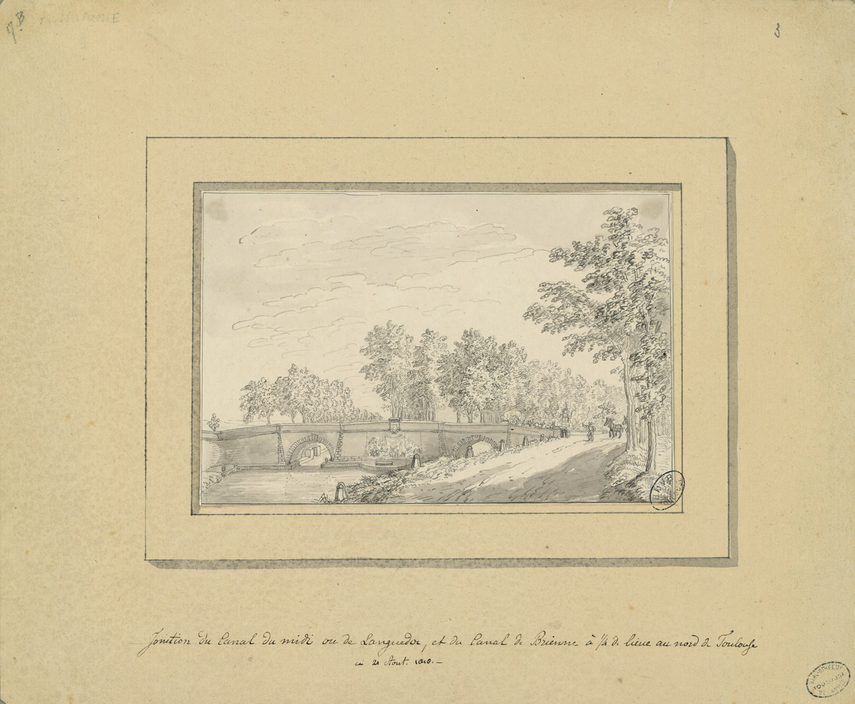 1 gravure sur cuivre en couleurs et 4 dessins à l'encre, dont 2 en couleurs Ancely, René (1876 - 1966). Possesseur